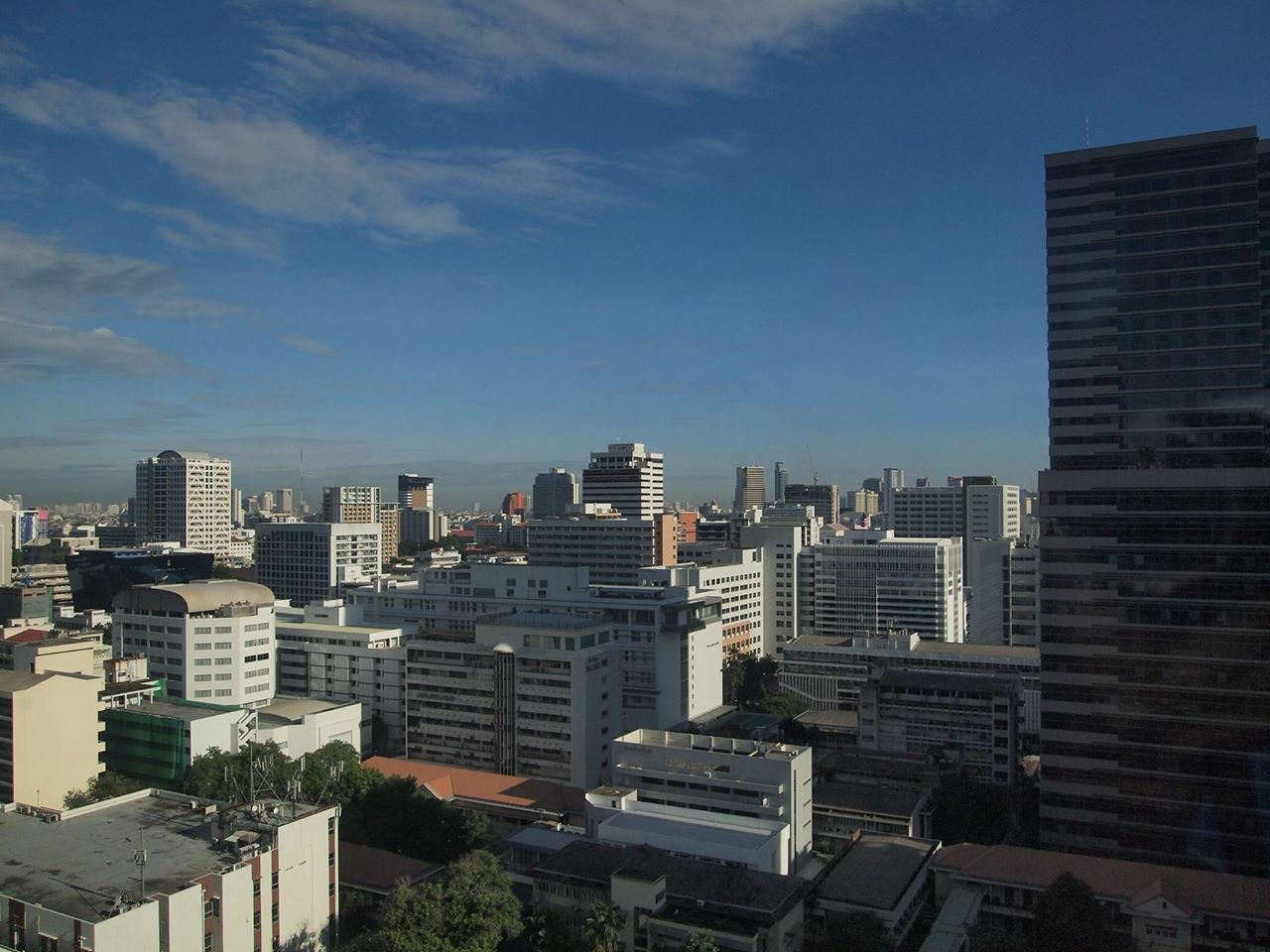 คณะแพทยศาสตร์ จุฬาลงกรณ์มหาวิทยาลัย และโรงพยาบาลจุฬาลงกรณ์ สภากาชาดไทย ถ่ายจากอาคาร ภปร.